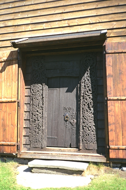 Stavkyrkjeportalen i Gaupne gamle kyrkje